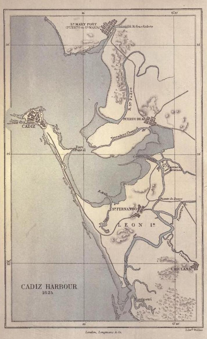 Mapa de la bahía de Cádiz en 1625. Extraído de la primera página del libro "History of England from the accession of James I to the outbreak of the civil war", vol I, de Samuel R. Gardiner, publicado en 1875. (Convertido de .pdf a .jpg).